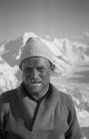 Fritz Wintersteller Sonstiges: Broad Peak Lager III Copyright: 1957 Fritz Wintersteller